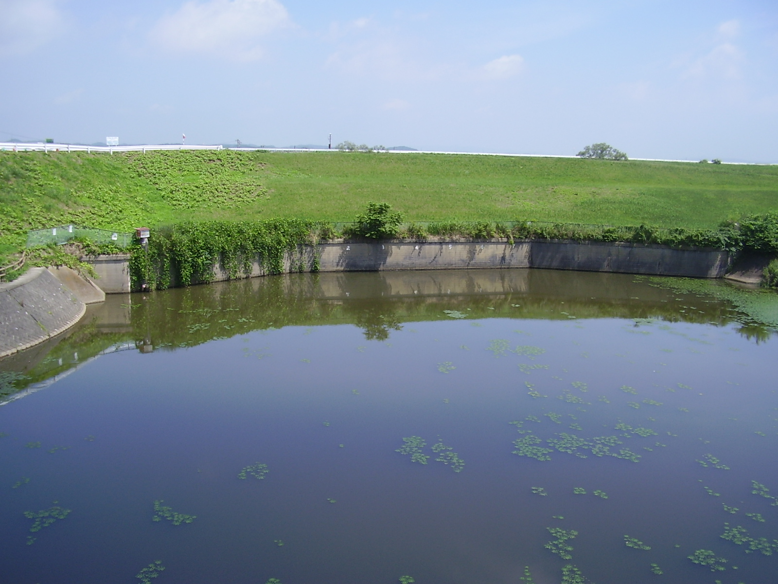 宮城県宮城郡松島町幡谷にある吉田川サイフォンの出口の写真。撮影日 2011-08-09